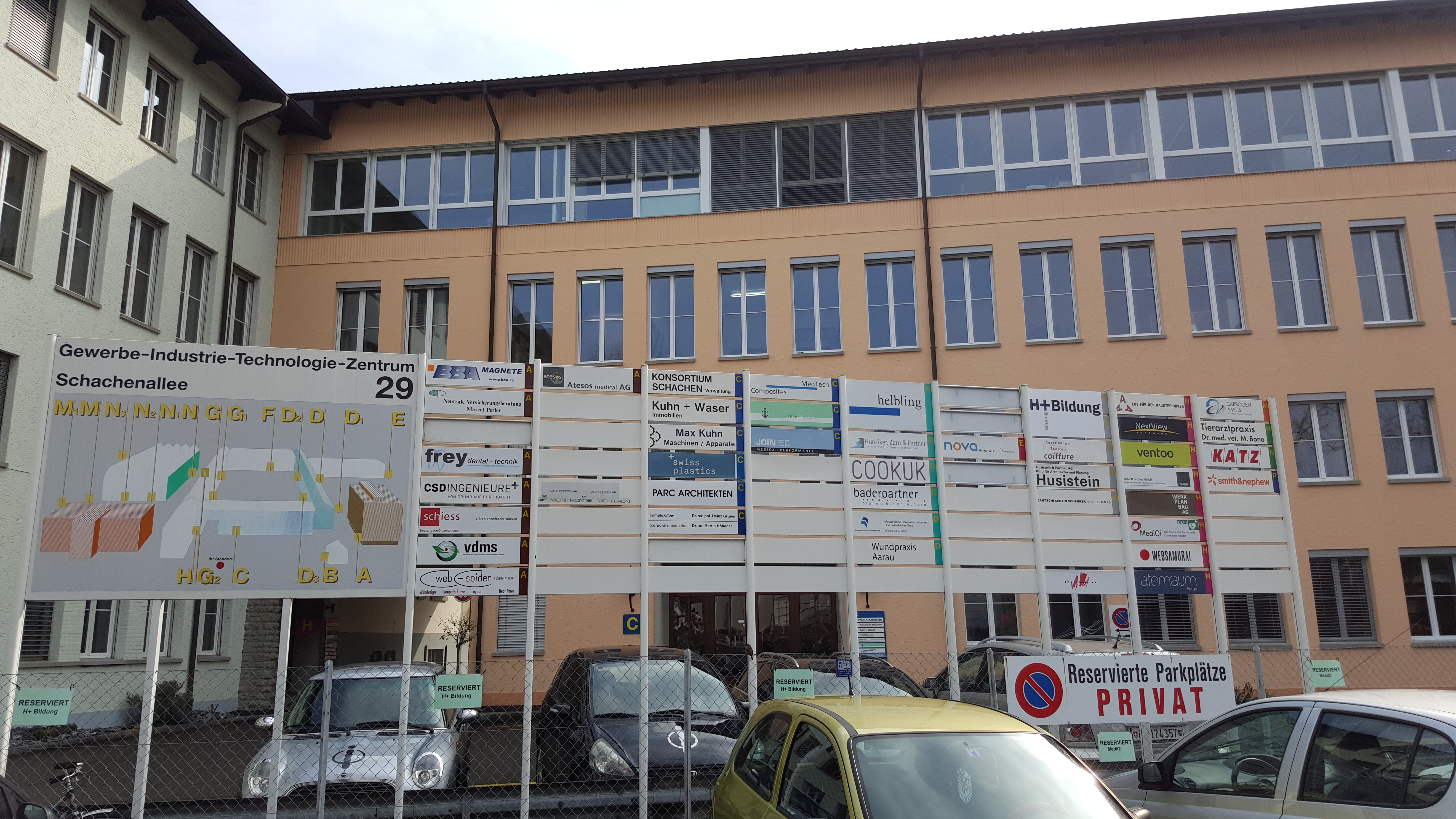 Eingang zum Sitz unserer Niederlassung im Kern an der Schachenallee 29, Eingang G in Aarau